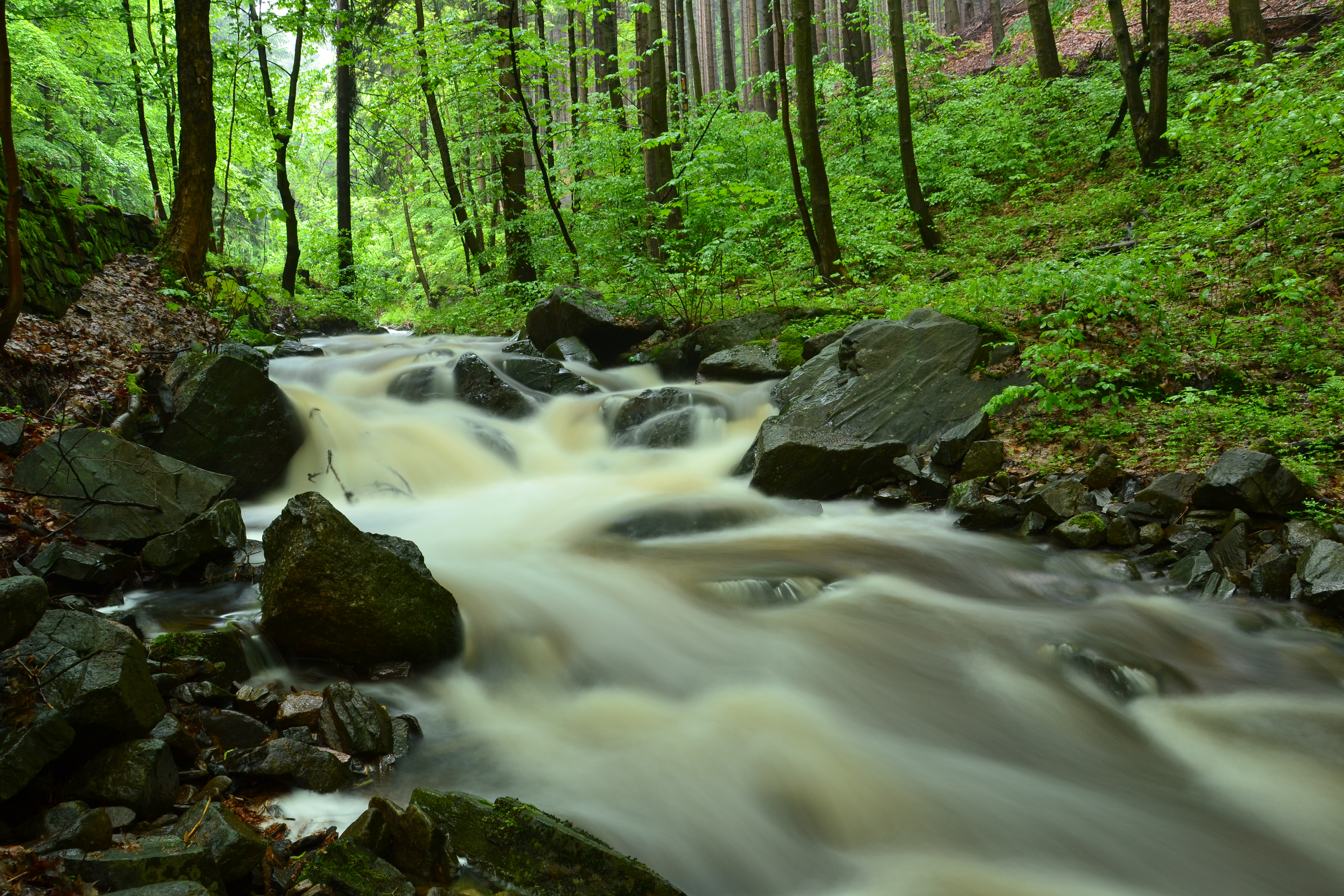 Přírodní park Bezručovo údolí - potok Kamenička